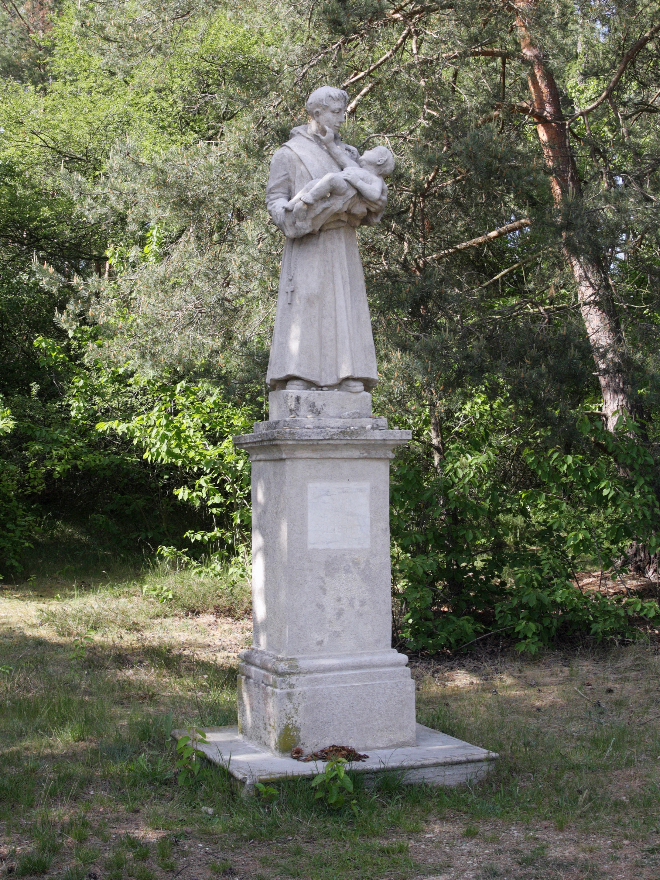 Konice (Znojmo) - socha sv Antonína Paduánského.